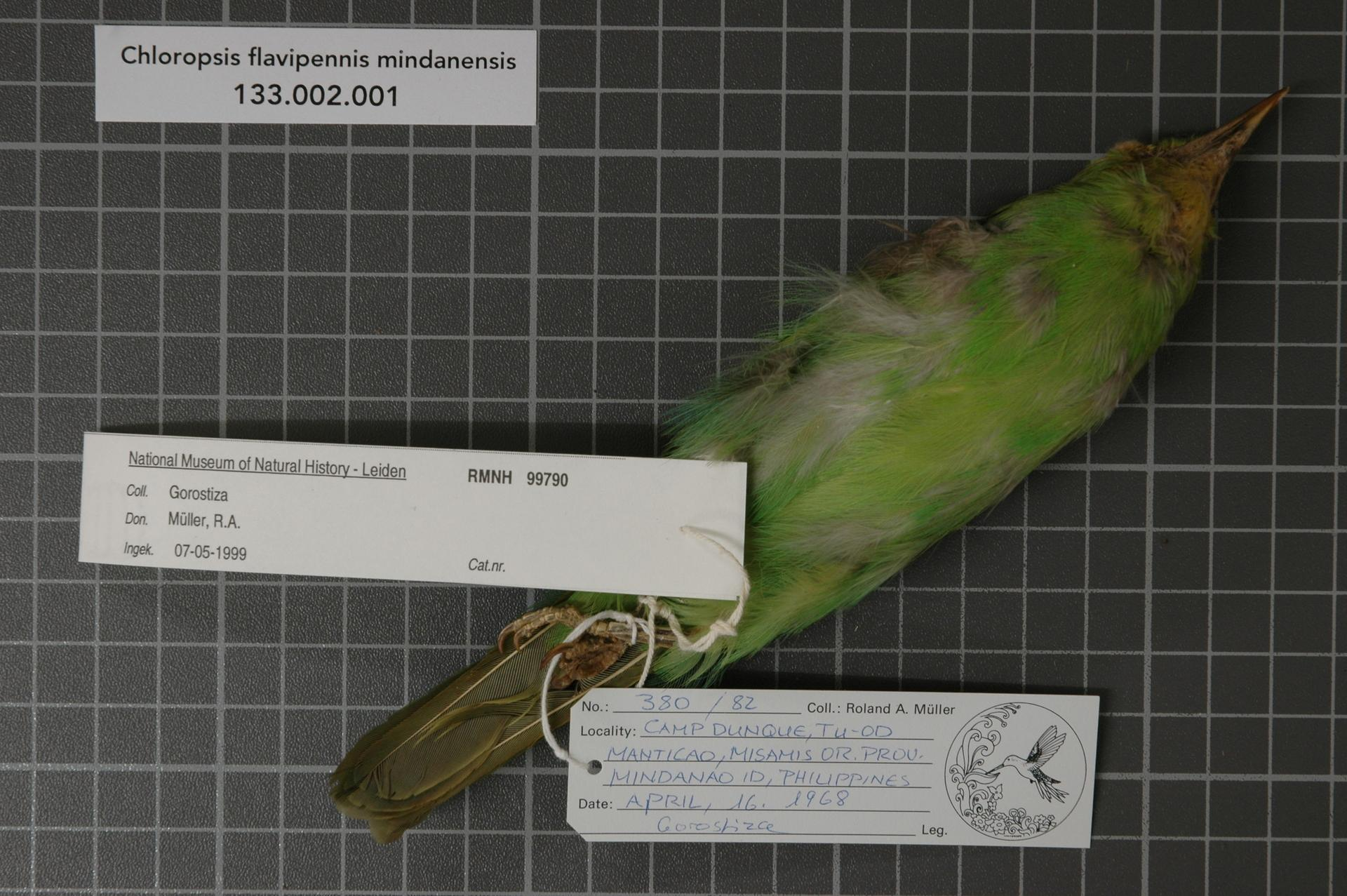 Chloropsis flavipennis mindanensis Salomonsen, 1953